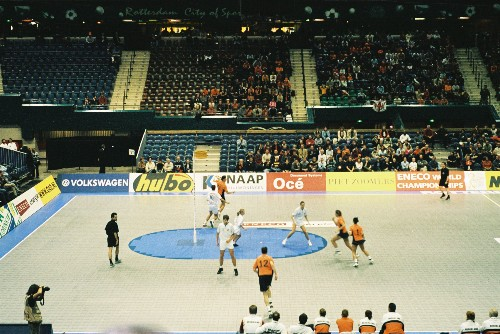 fotoğraf benim tarafımdan çekilmiştir